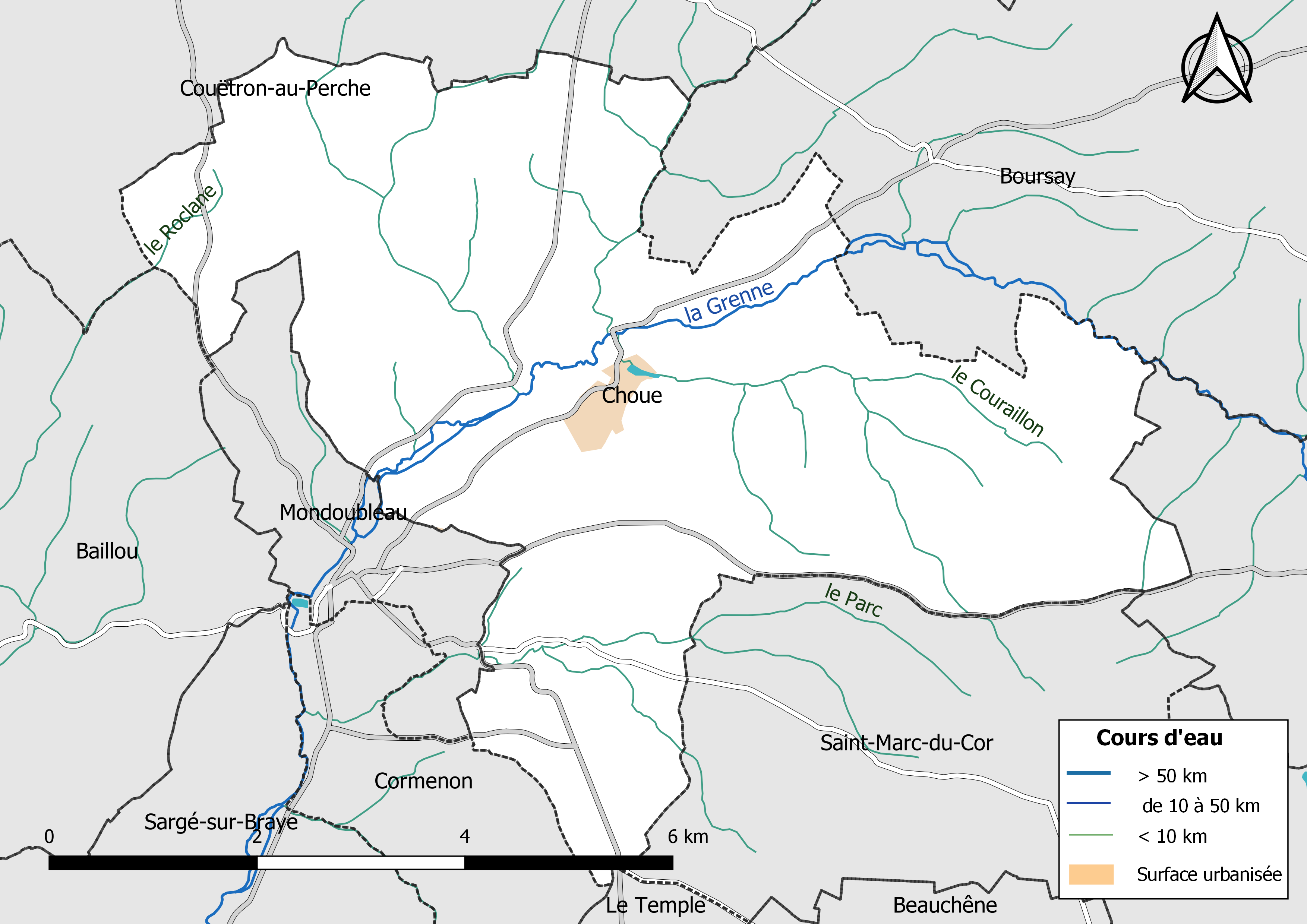 Carte du réseau hydrographique de la commune de Choue (Loir-et-Cher, France).